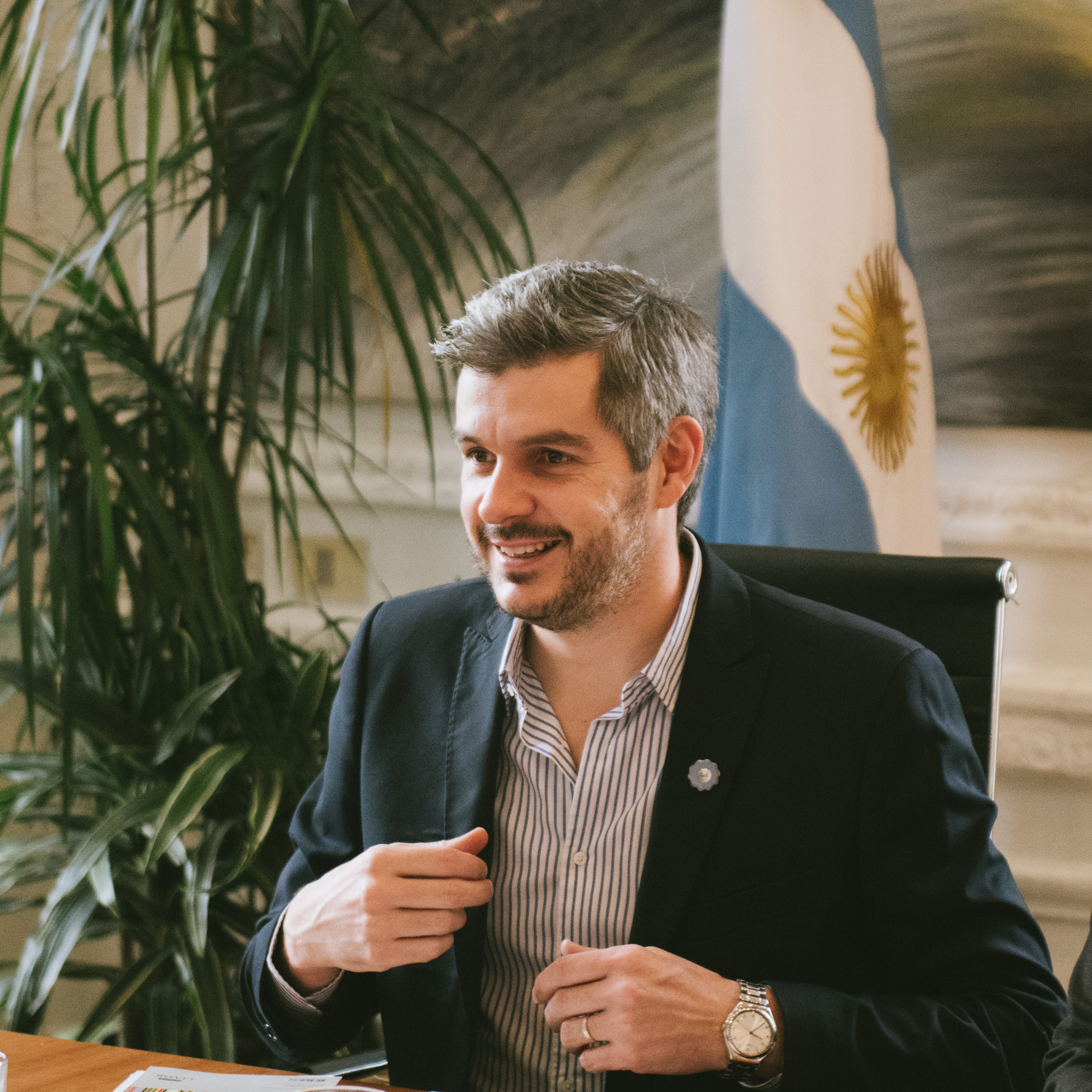 Marcos Peña, Jefe de Gabinete de la República Argentina